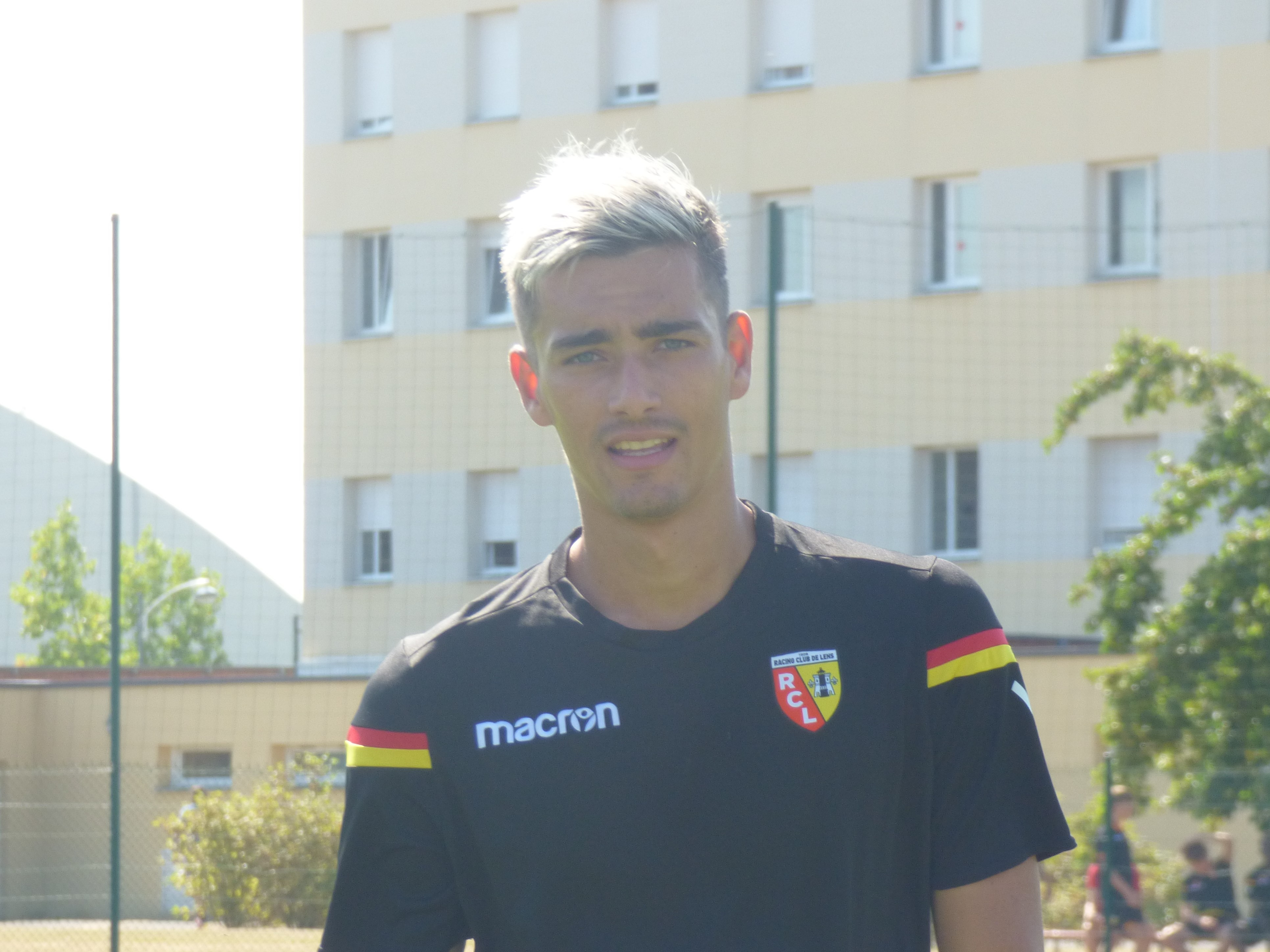 Maxence Carlier lors d'un entraînement public du Racing Club de Lens, le 2 août 2018, au Centre technique et sportif de La Gaillette à Avion.